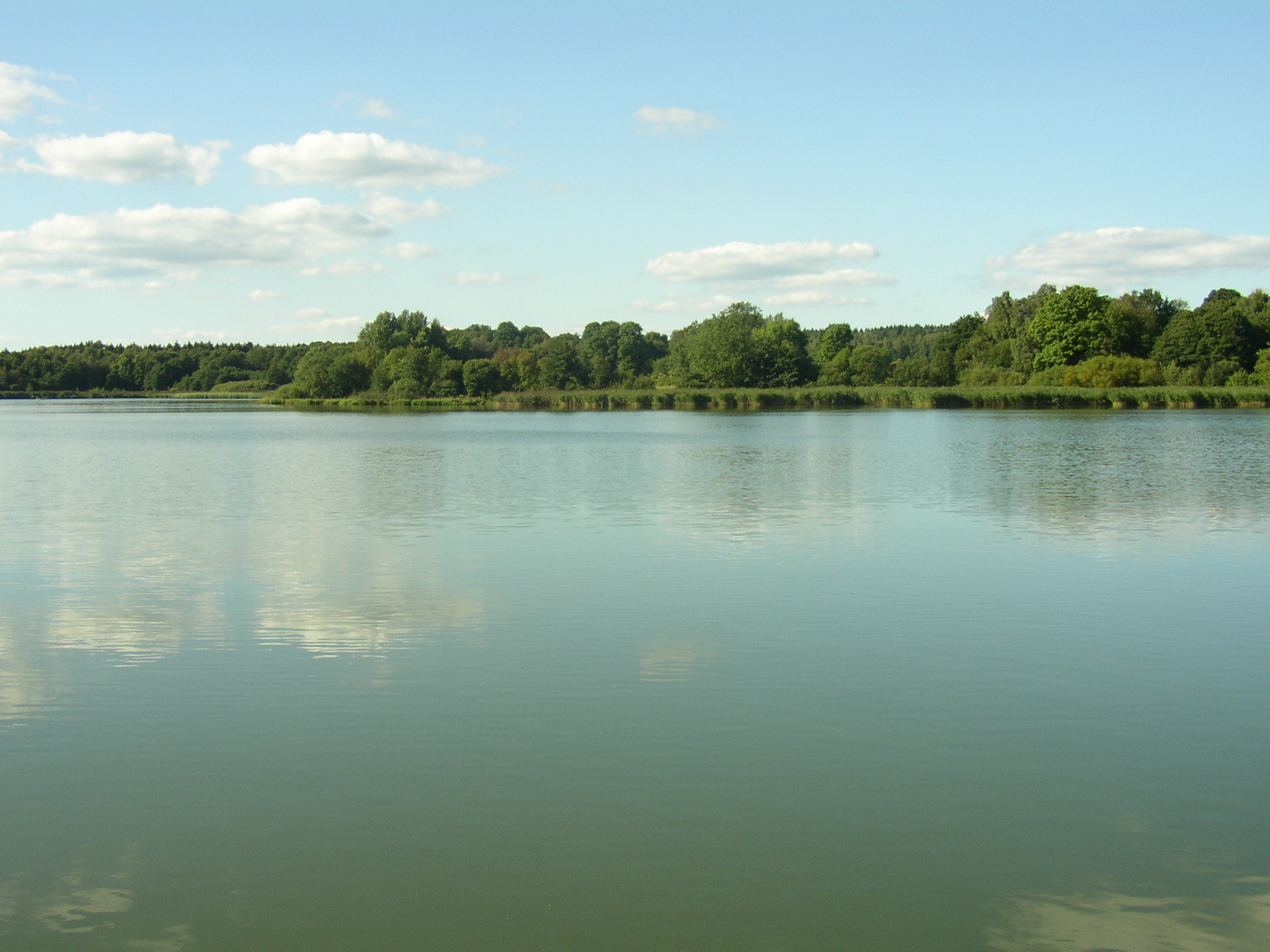 Velký rybník, Rybniště, okres Děčín, Česká republika, pohled z hráze